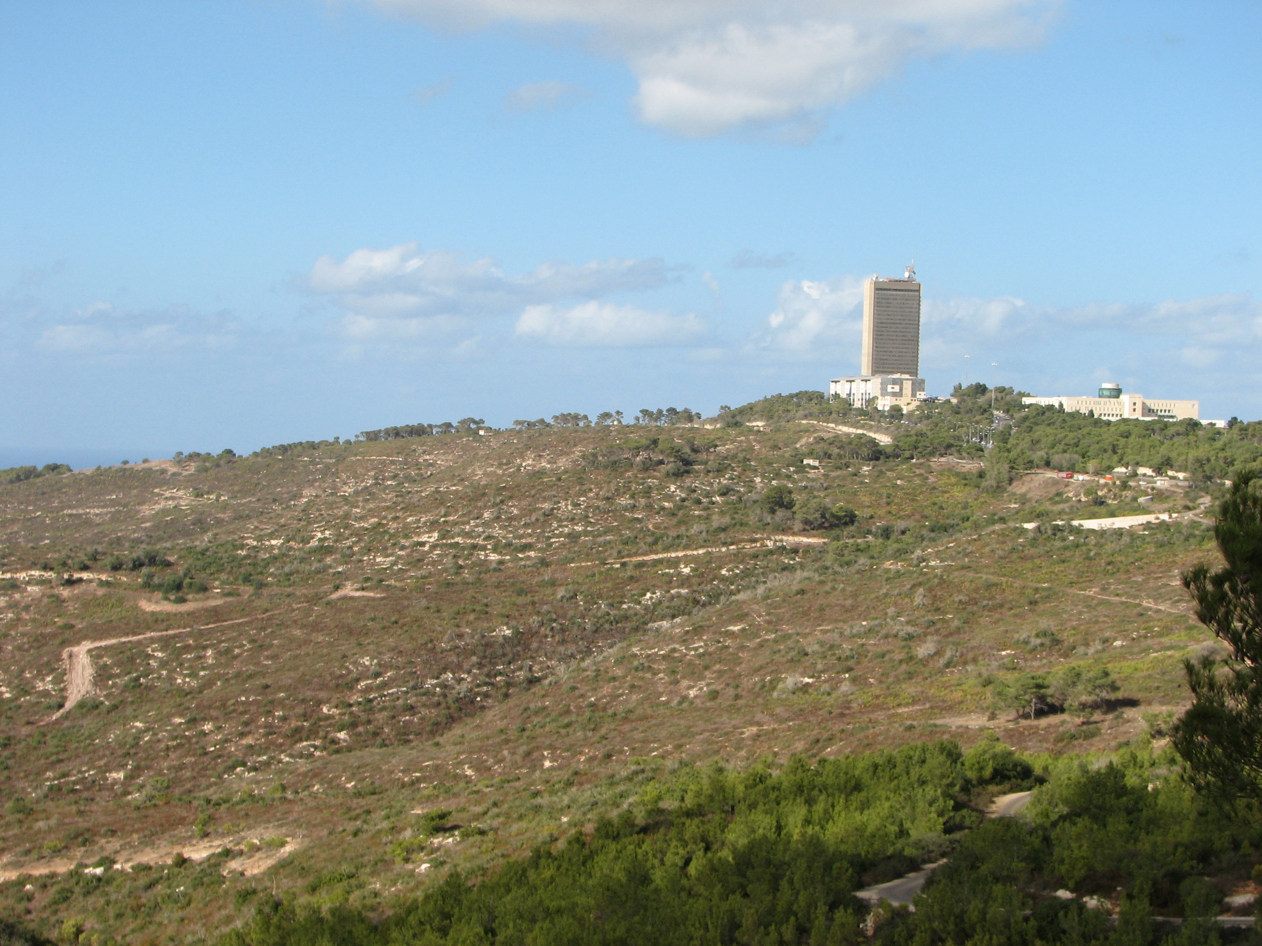 Area that was burned in Mount Carmel forest fire 1989 near Haifa University השטח ממערב לאוניברסיטת חיפה שנשרף בשריפה של 1989. מראה השטח לאחר 21 שנים, אזור שמורת נחל כלח ונחל גלים.